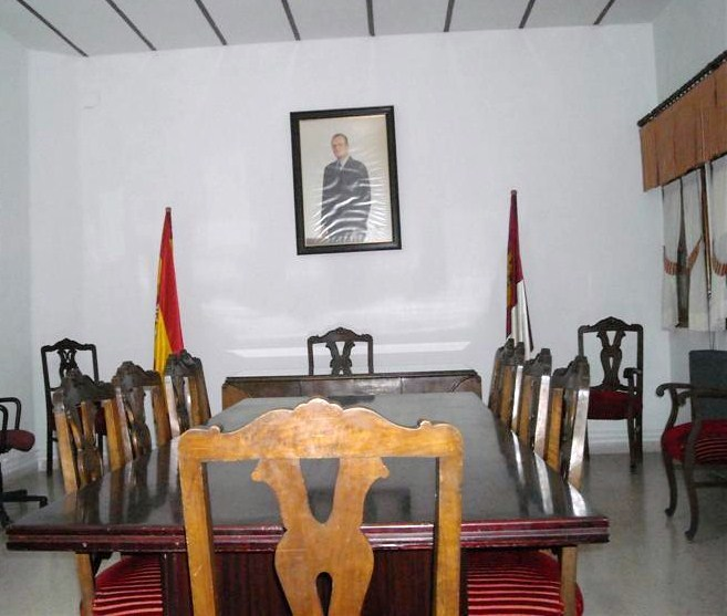 Fotografía del Salón de Plenos del Ayuntamiento de Molinicos (Albacete)